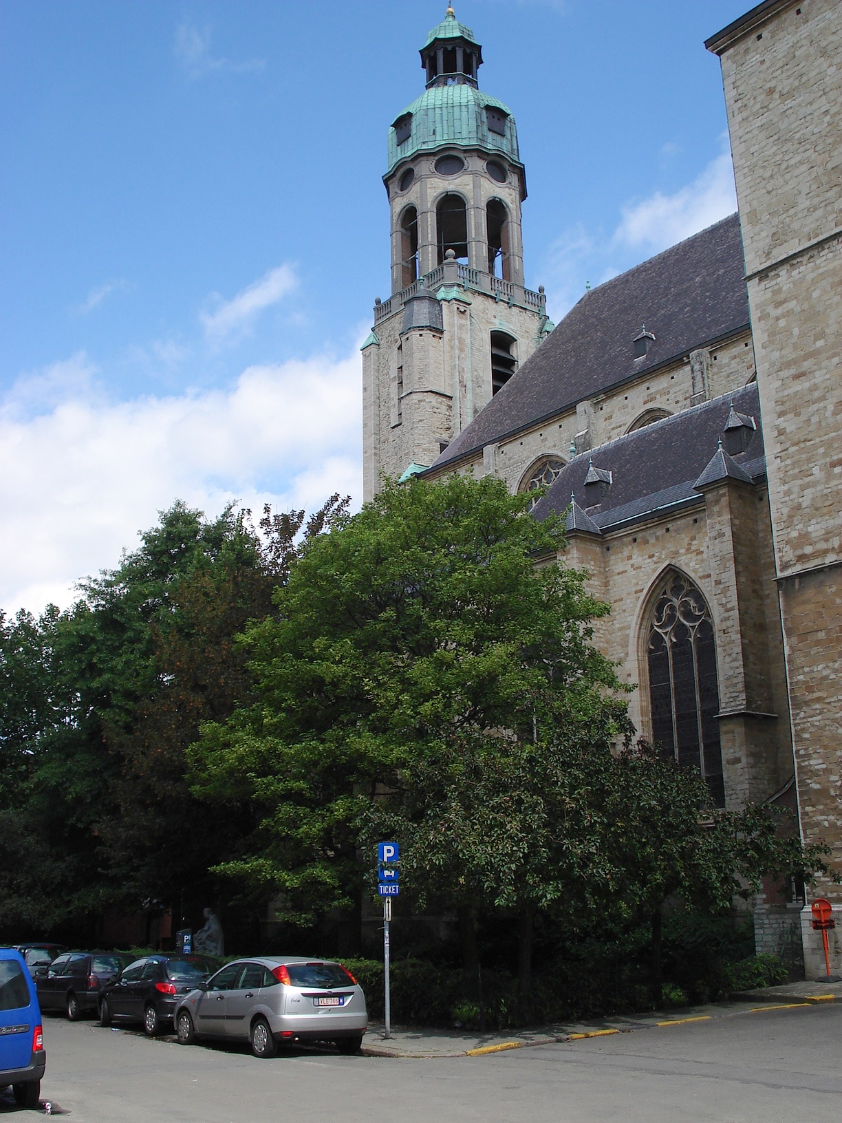 Standbeeld Netje Statue de Netje Sint-Andrieskwartier Antwerpen Anvers